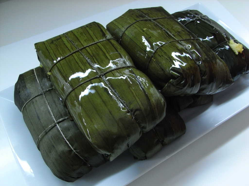 Hallacas recien cocidas